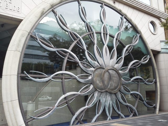 御池幸登ビル（イタリヤード旧本社ビル）